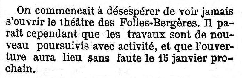 Rubrique Bruits de coulisses, Le Gaulois, 17 décembre 1868, page 3, 6ème colonne, à propos des Folies Bergère.